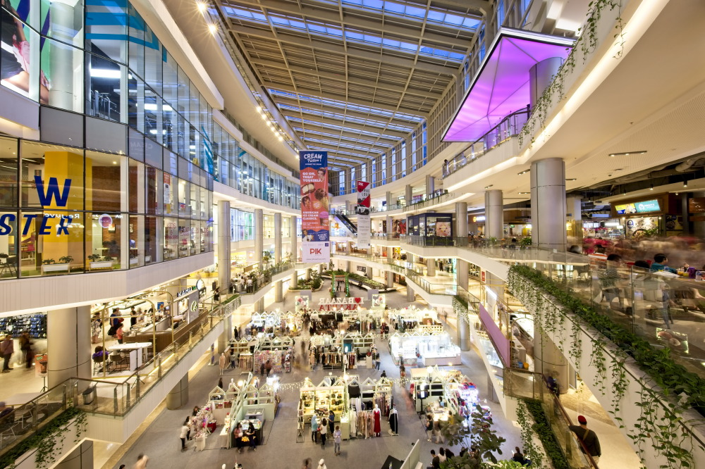 Tampak auditorium PIK Avenue